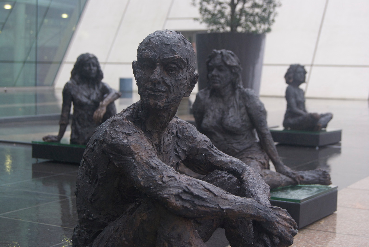 Template:Cécile RAYNAL , fr